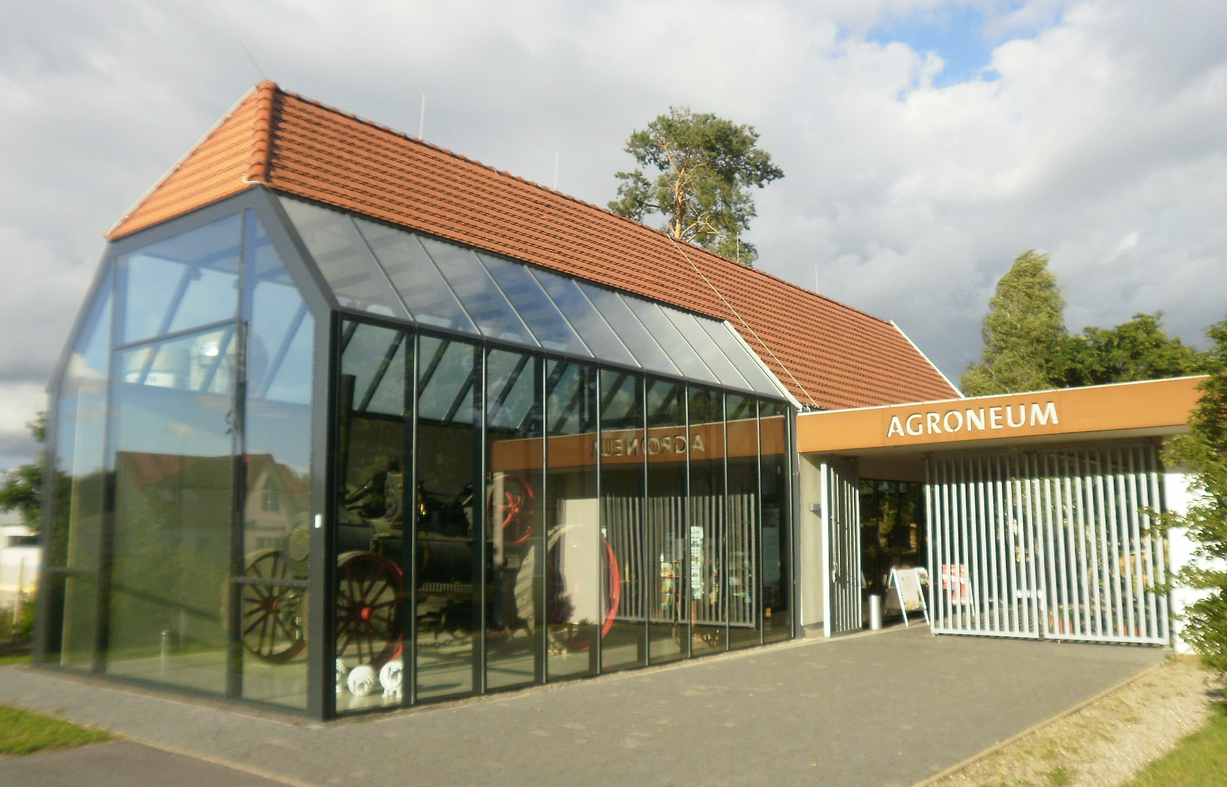 Eingang/Hauptgebäude vom Agroneum